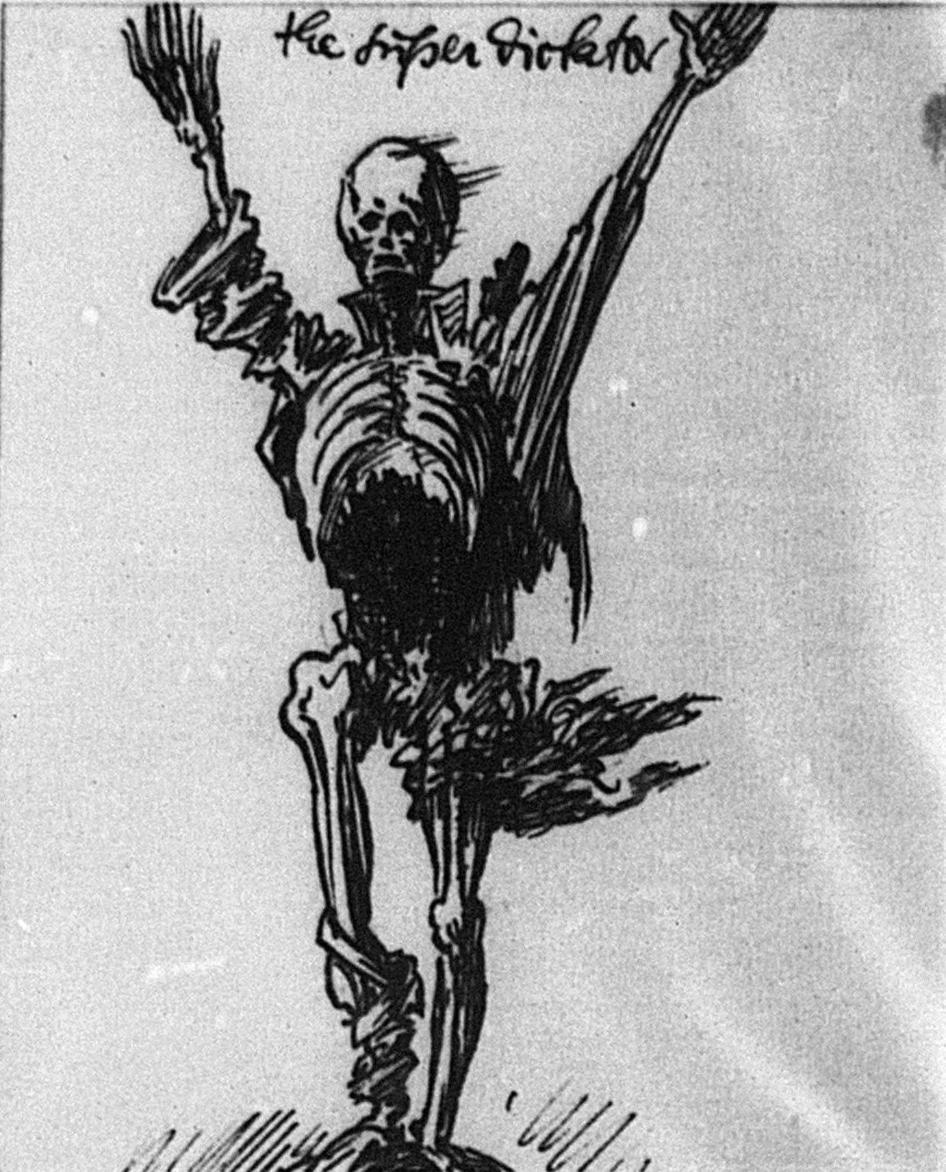 Gustav Wolf The superdictator circa 1945